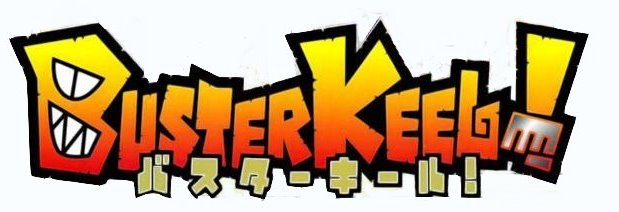 Logo du manga Buster Kell